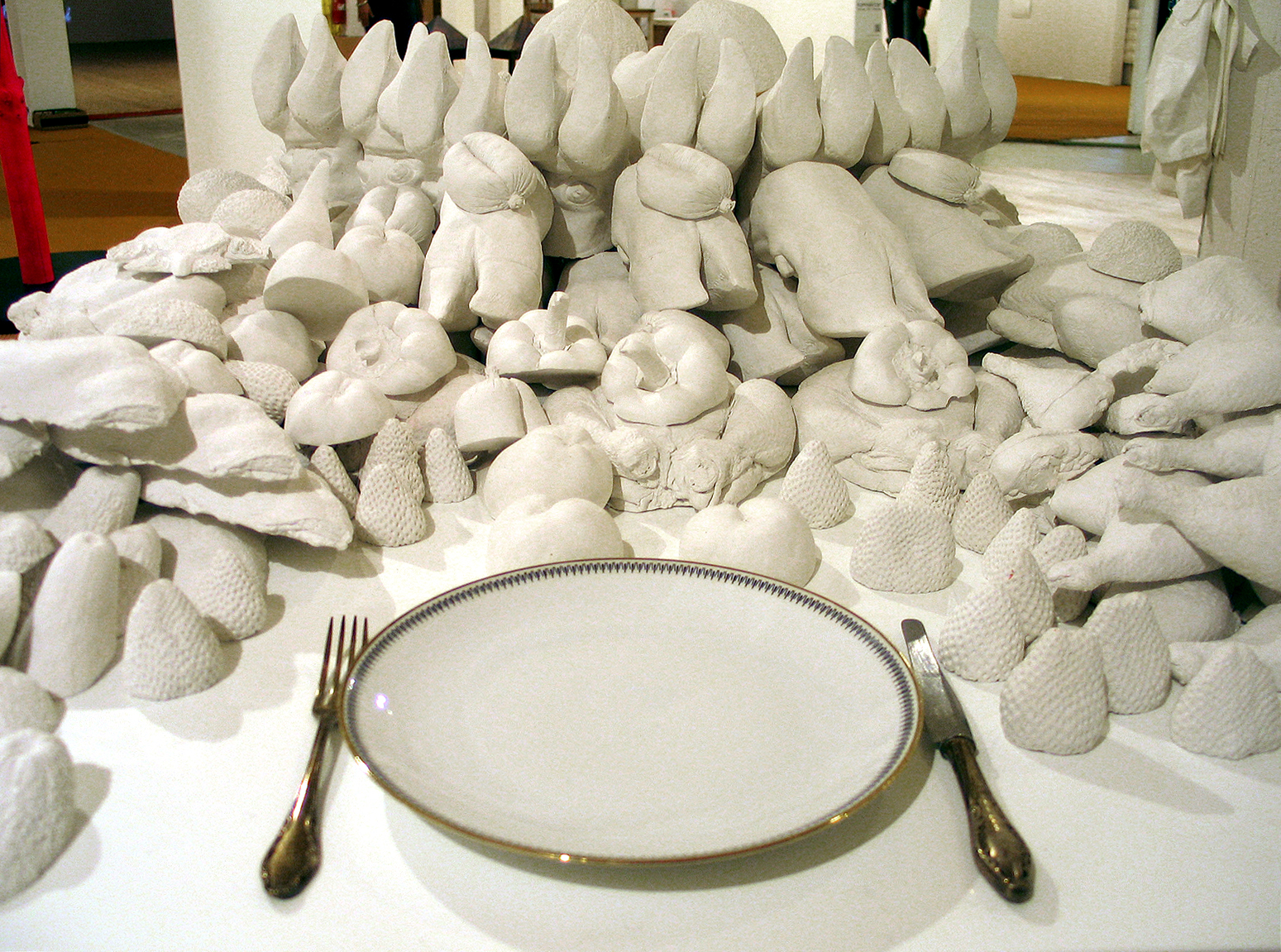 "Rein weiss" ist diese Komposition aus Beinenden von Paarhufern, Geflügelkeulen und Obst und Gemüse, angerichtet durch den Künstler Edin Bajrić auf der Art (F)Air 2012, Messe für zeitgenössische Kunst in Hannover ...